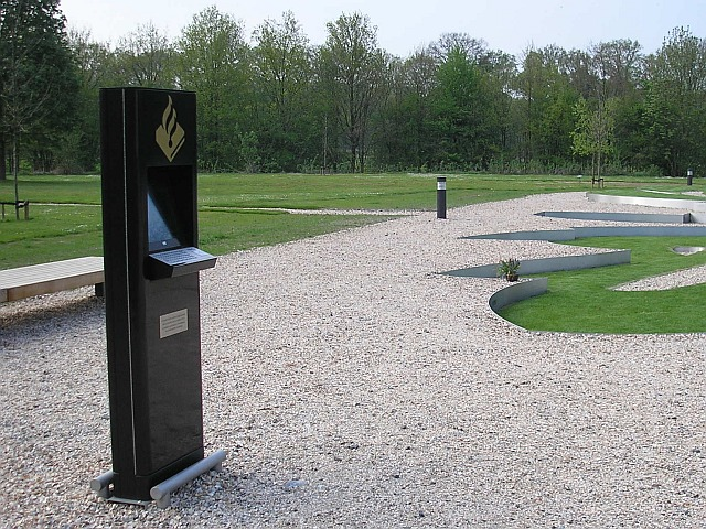 Tuin van Bezinning; Videozuil met informatie over de geëerde politiemensen. Nationaal monument ter ere van tijdens de uitoefening van de dienst overleden Nederlandse politiemensen. Locatie: Achter koetshuis van Huis 't Velde te Warnsveld (NL) Foto: Pudding4brains, 5 mei 2006 - Volledig vrijelijk te gebruiken ('Publiek Domein') Categorie:Afbeelding Tuin van Bezinning